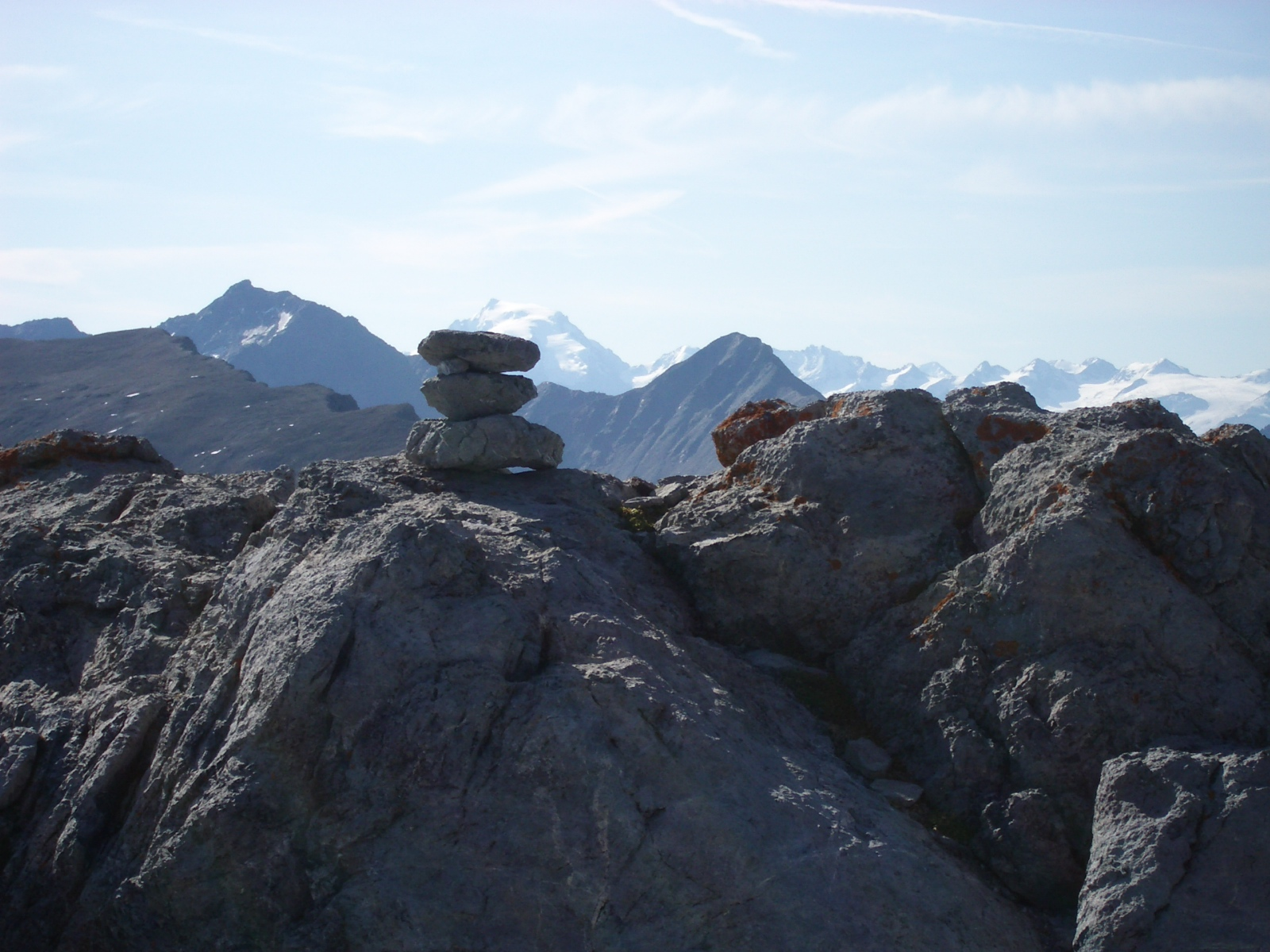 Lischana hut GR, Switzerland self-made, September 2006